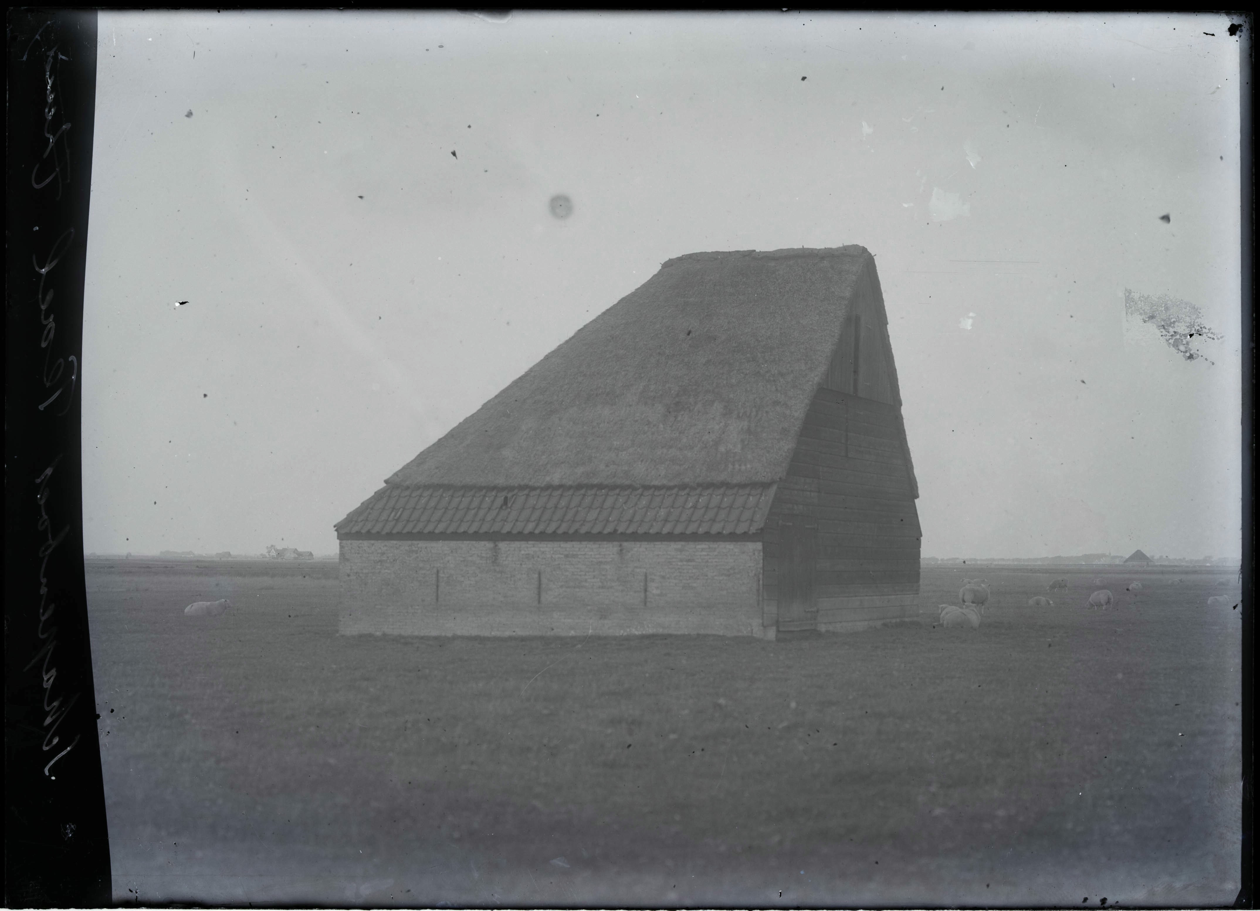 Texelse schaapsboet: Overzicht van een Texelse boet of achaapsboet (schaapskooi)